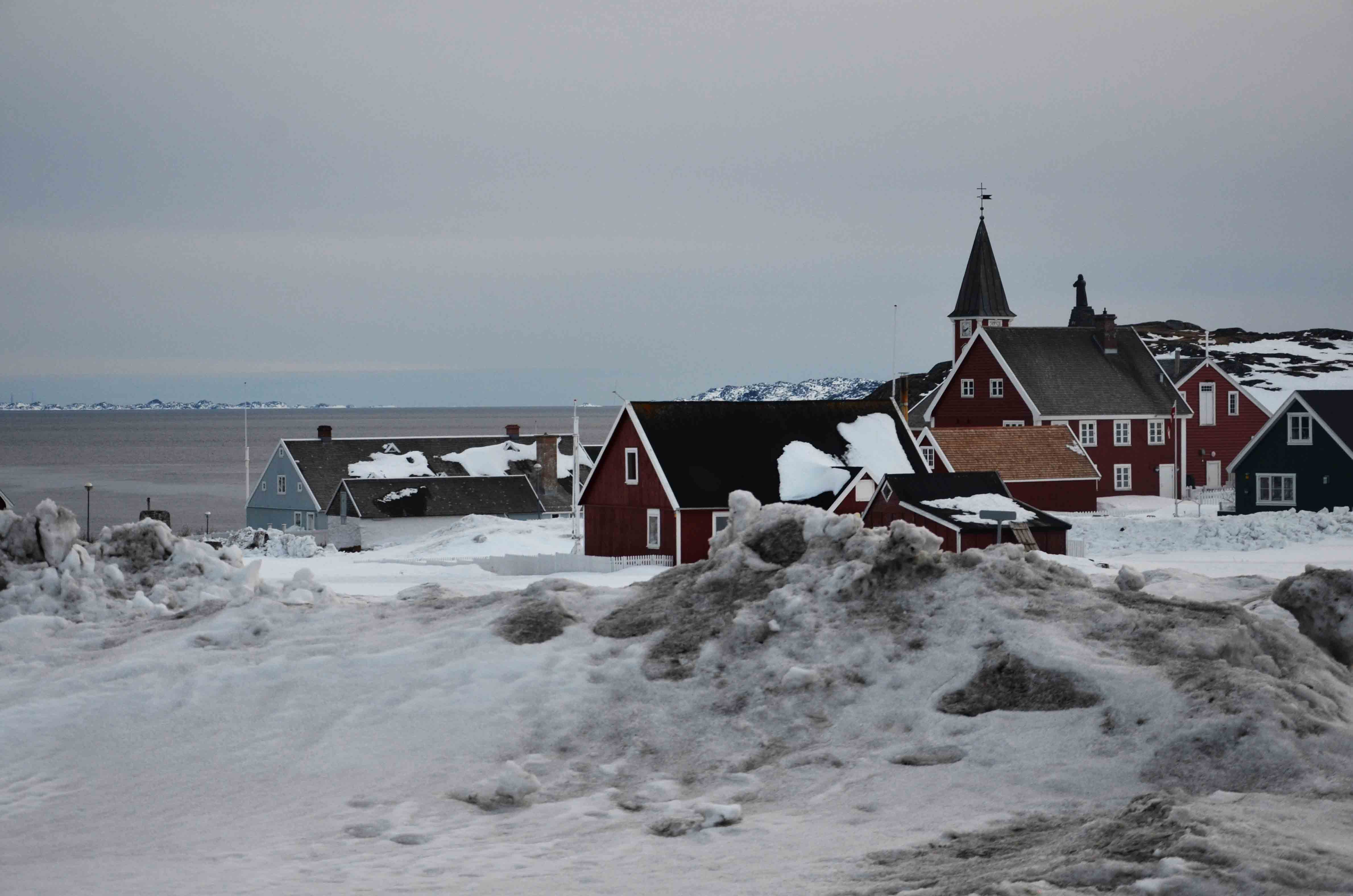 Pierwsze dni wiosny w stolicy Grenlandii.